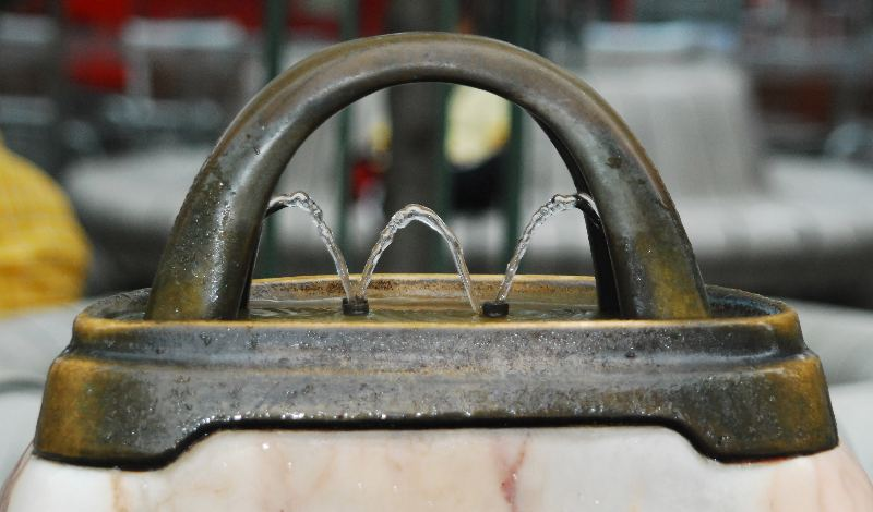 Wiener Trinkbrunnen, auch Muhr-Brunnen nach dem Schöpfer genannt. An der Oberseite bilden Wasserstrahlen ein "W" für Wien bzw. Wasser